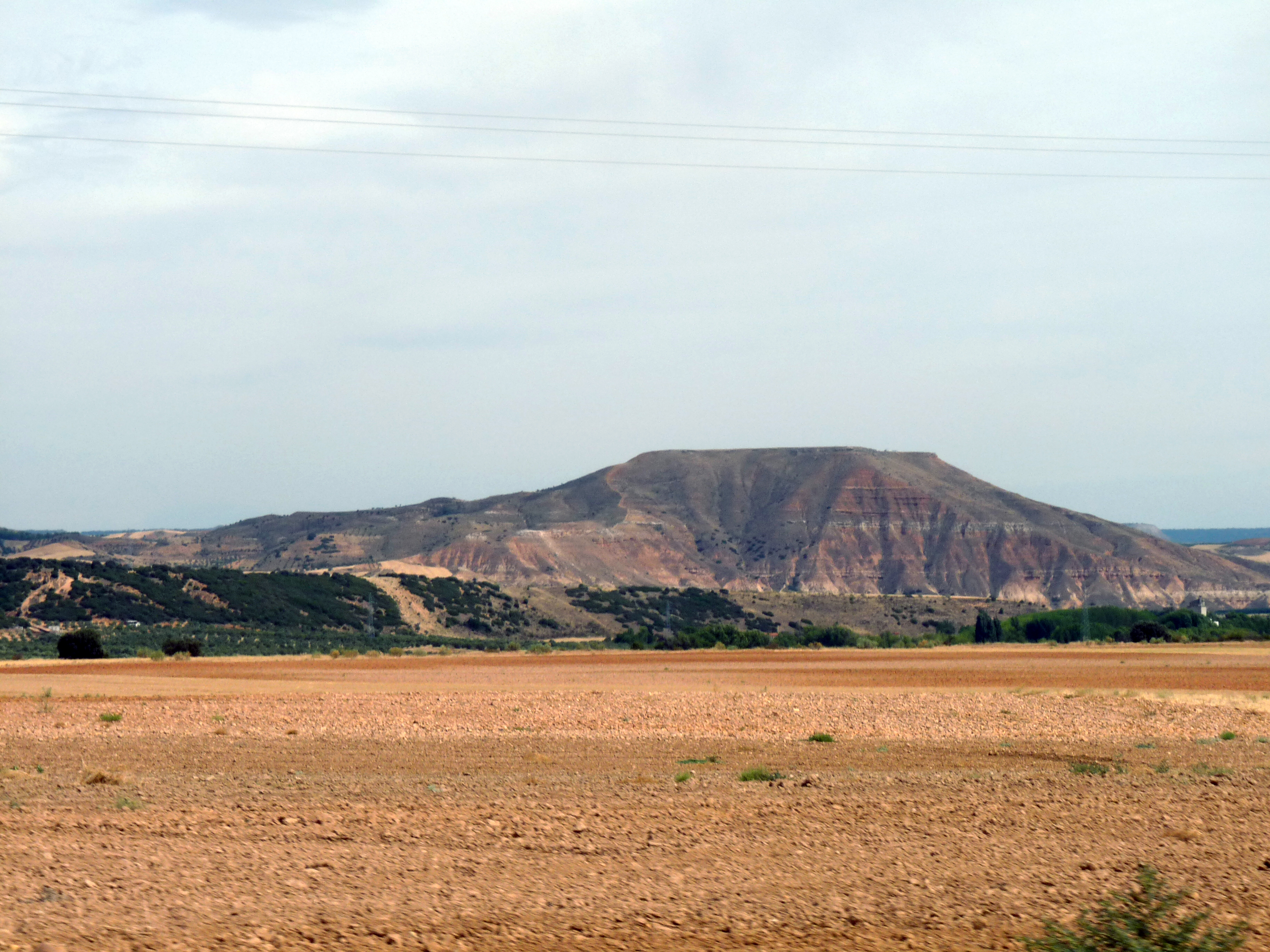 Paisaje en las cercanías de Humanes, provincia de Guadalajara, España.